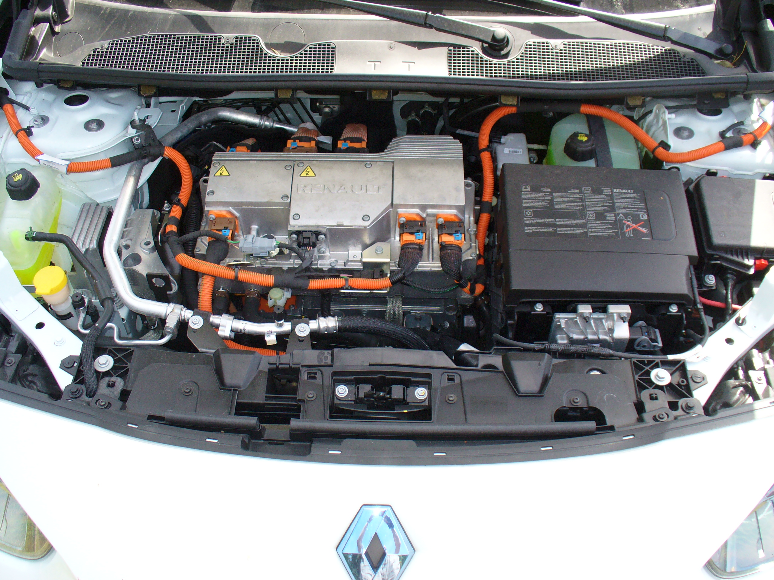 Renault Fluenze Z.E., Ansicht Motorraum von vorn